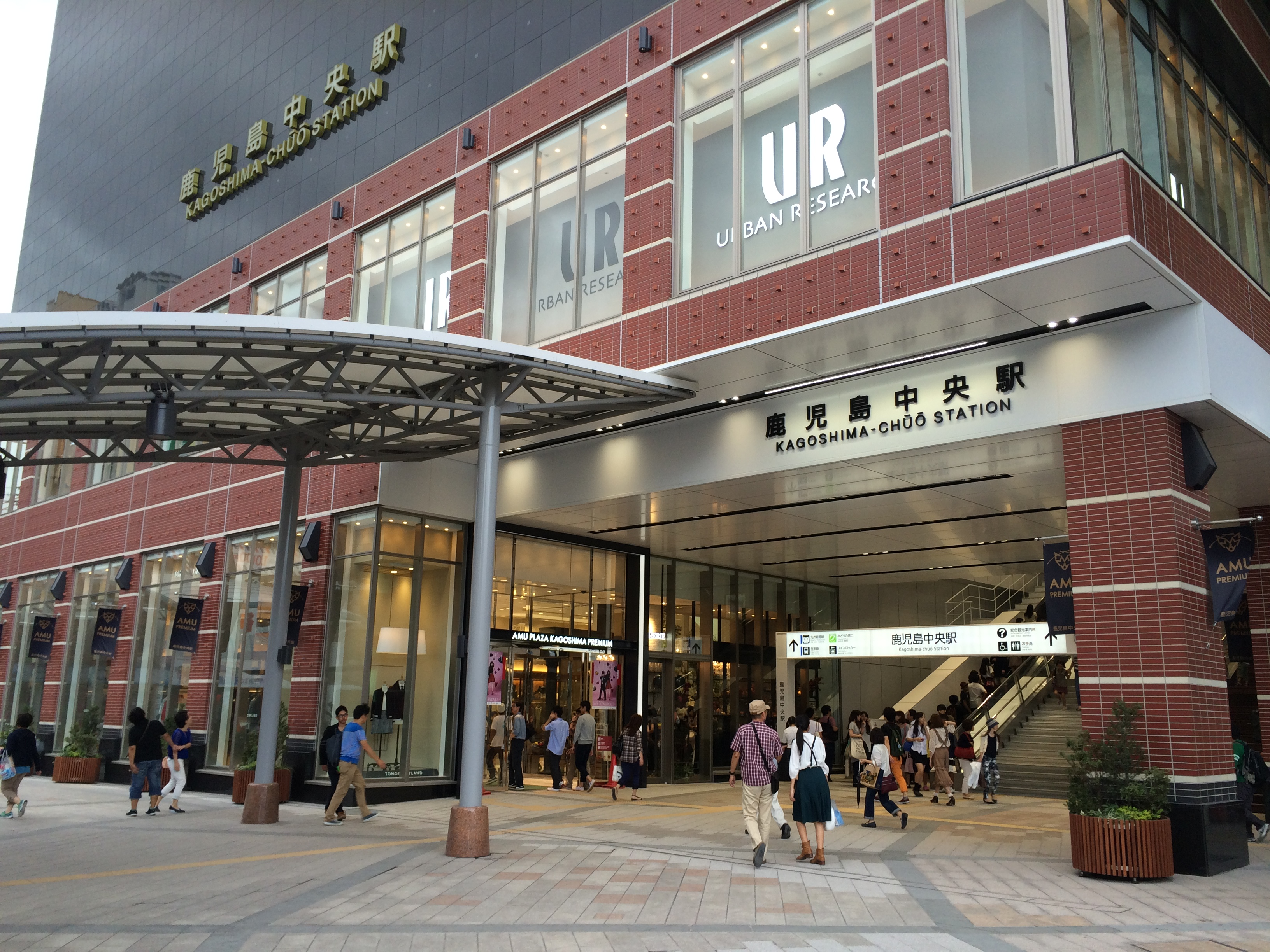 鹿児島中央駅桜島口